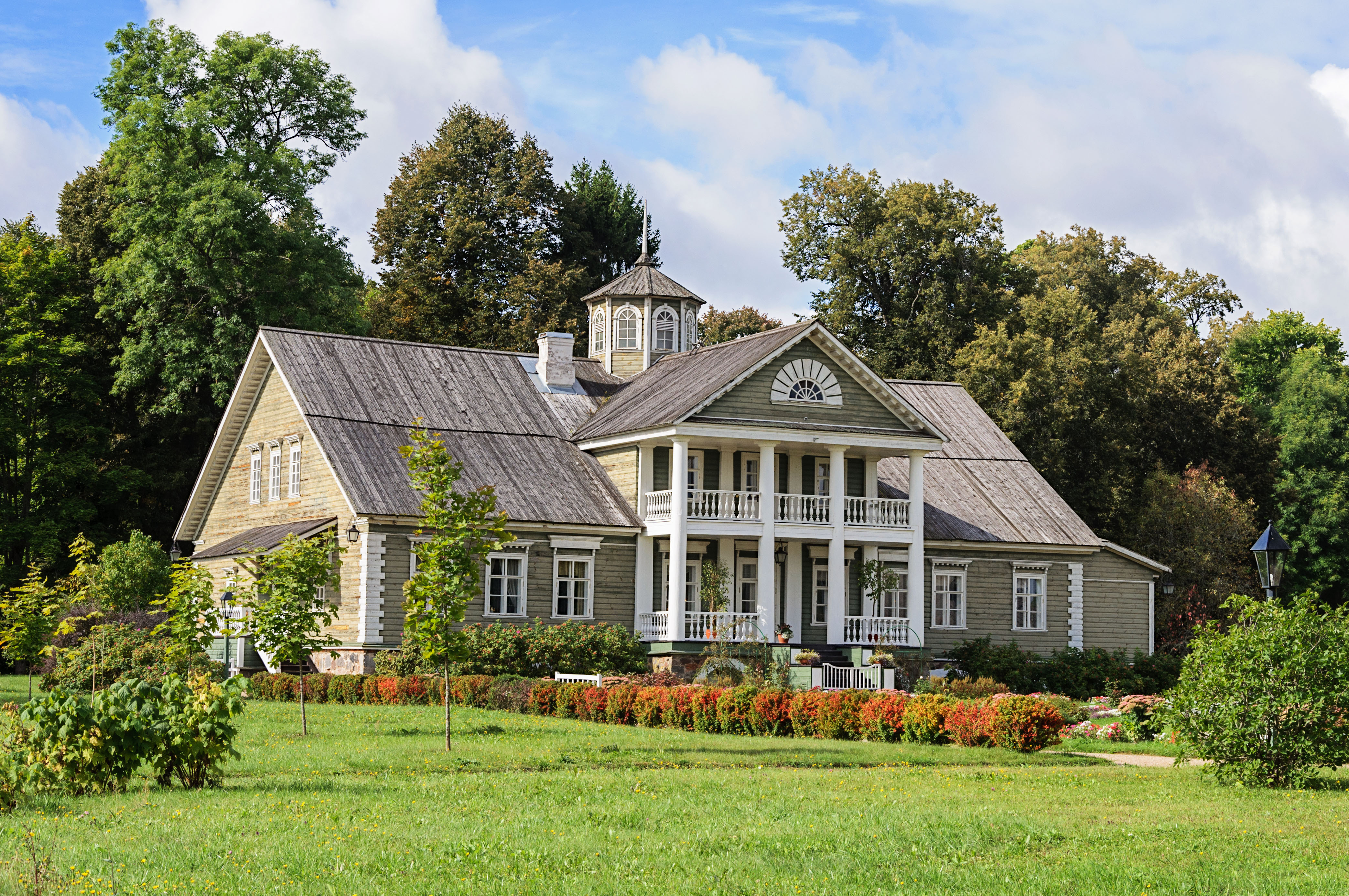 Михайловское заповедник: Пушкиногорский район, Псковская область This image is related to the protected area of Russia number 6000325